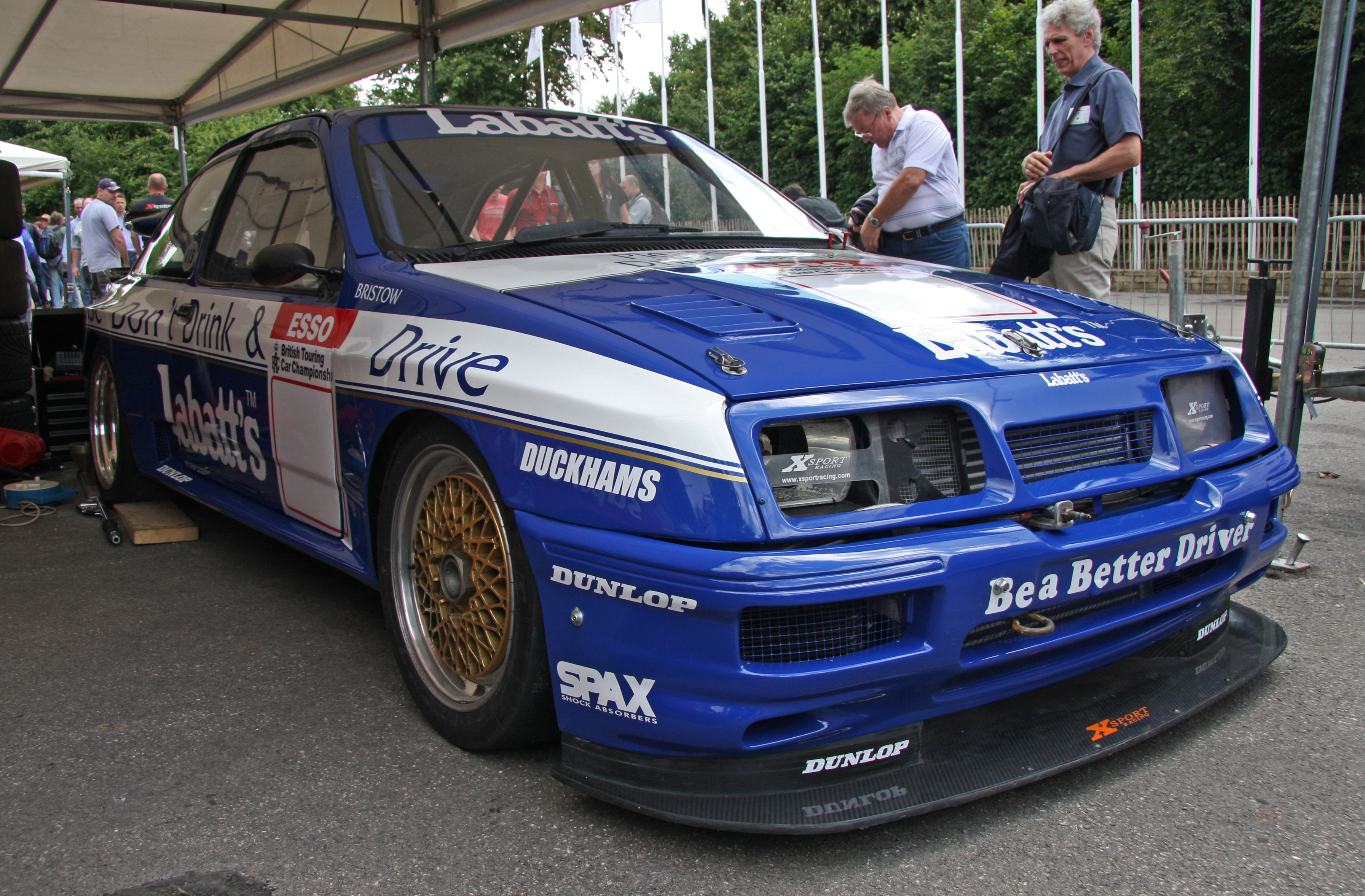 Built 1990. 2 litre 4 cylinder